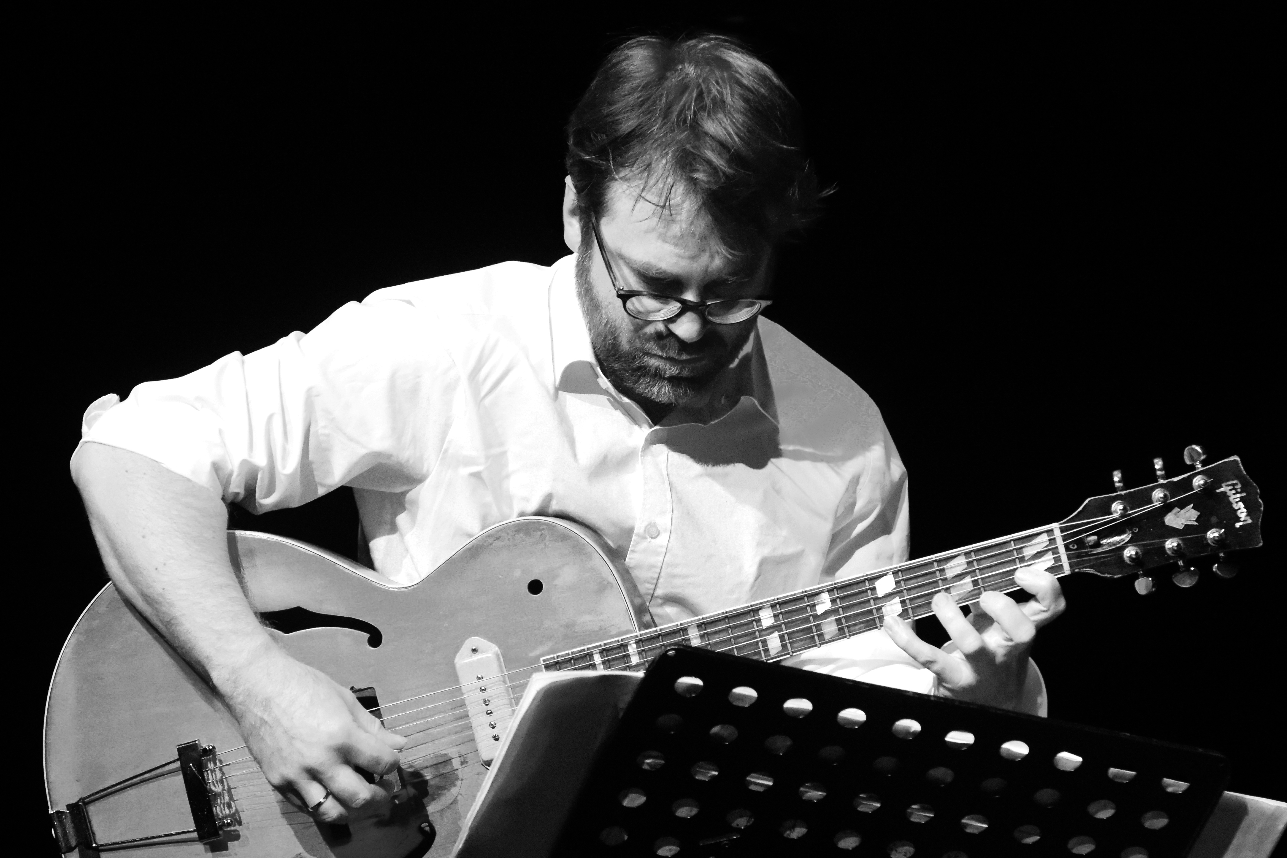 Konzert mit dem trio Rosenrot in der Stadthalle Aalen Fotograf: Herbert Kullmann